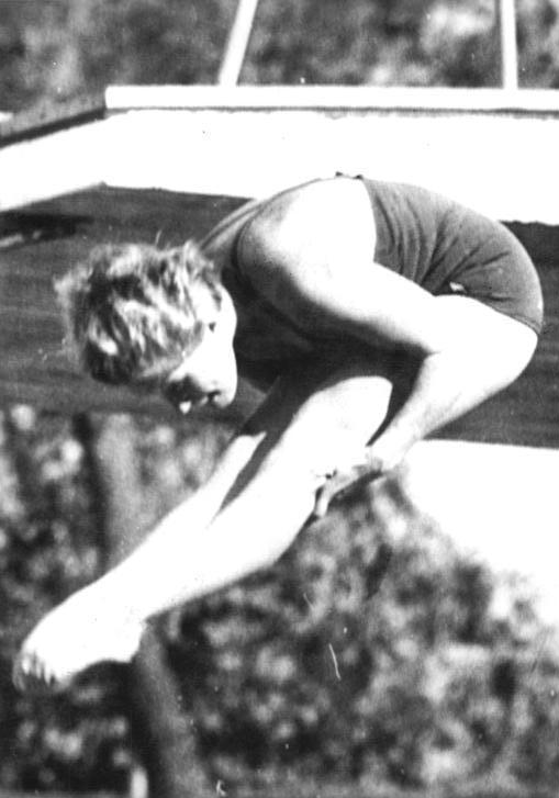 Zentralbild-AP Telefoto Tre-Noa A.V. 3518 28.8.1960XVII. Olympische Sommerspiele 1960 in Rom. Am 27.8.1960 schlug die 17jährige DDR-Sportlerin Ingrid Krämer im Schwimmstadion zu Rom die gesamte Weltelite und errang eine Goldmedaille im Kunstspringen. UBz: Eine vorbildliche Körperbeherrschung zeigt Ingrid Krämer bei ihren Sprüngen.